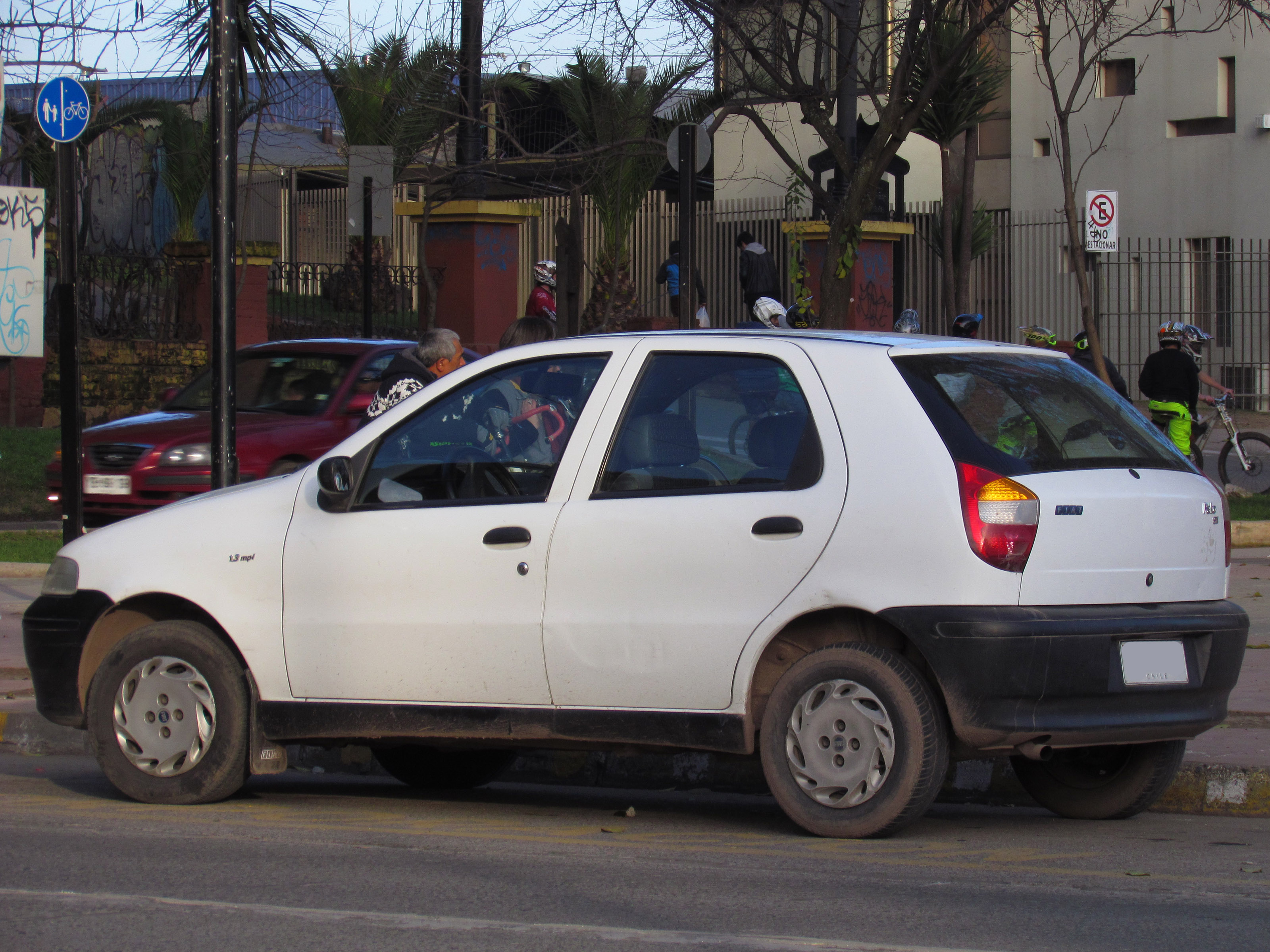 Fiat Palio 1.3 SX 2003